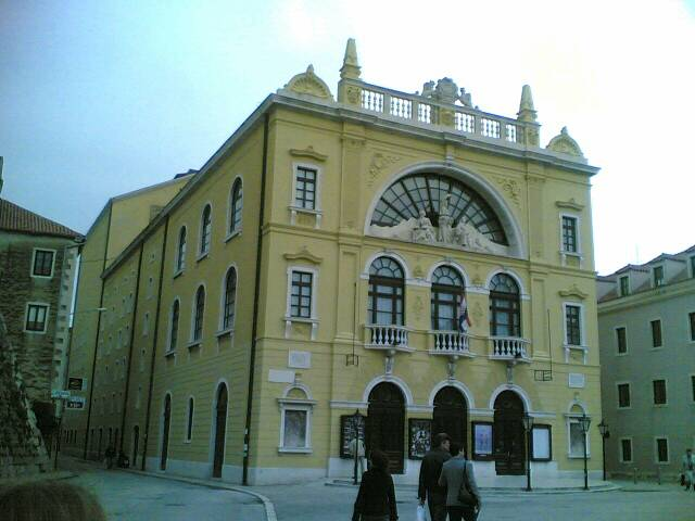 Hrvatsko Narodno Kazaliste Split (Croatian National Theatre in Split)